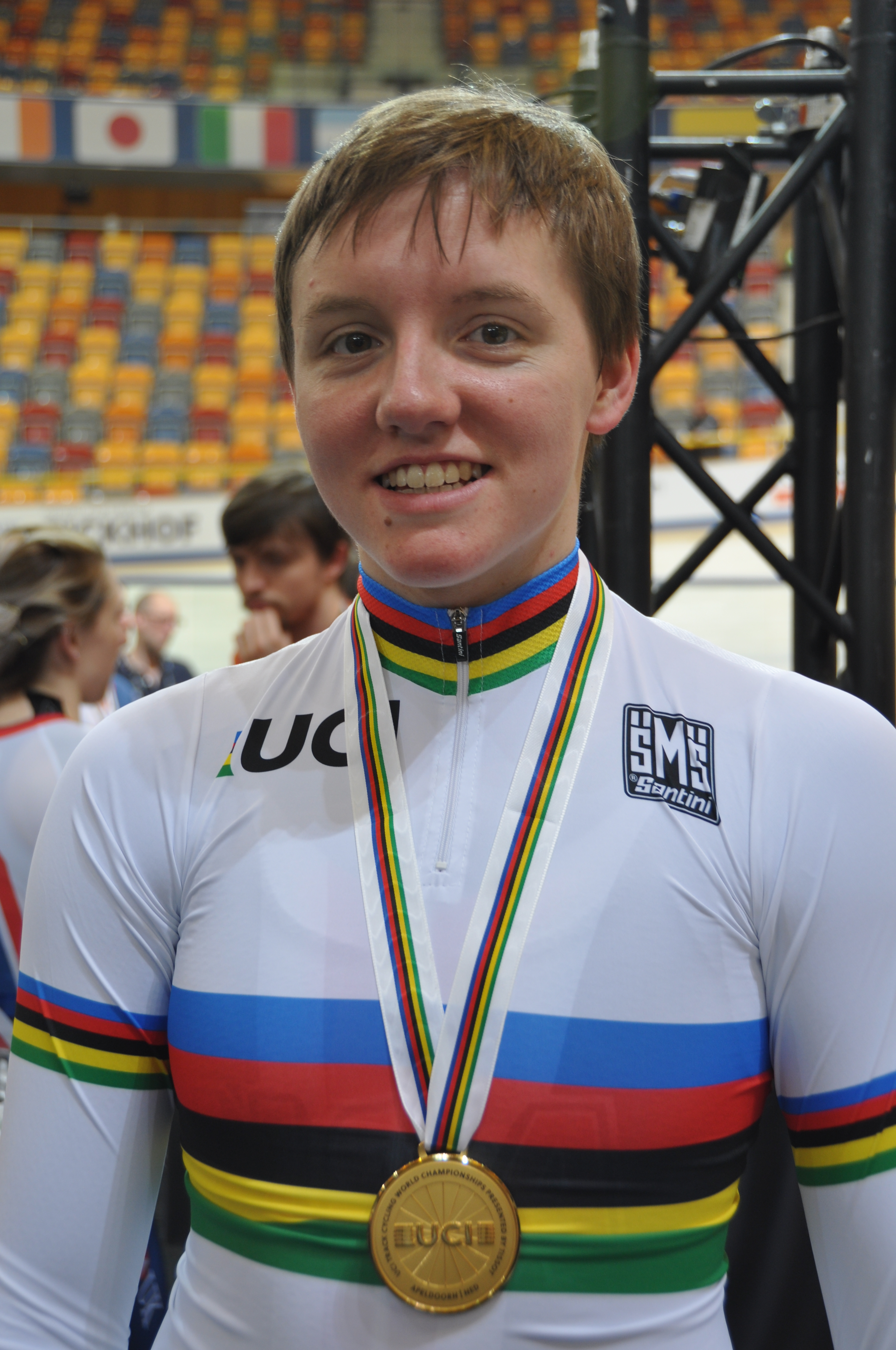 Kelly Catlin, US-amerikanische Radsportlerin, Gold in der Mannschaftsverfolgung